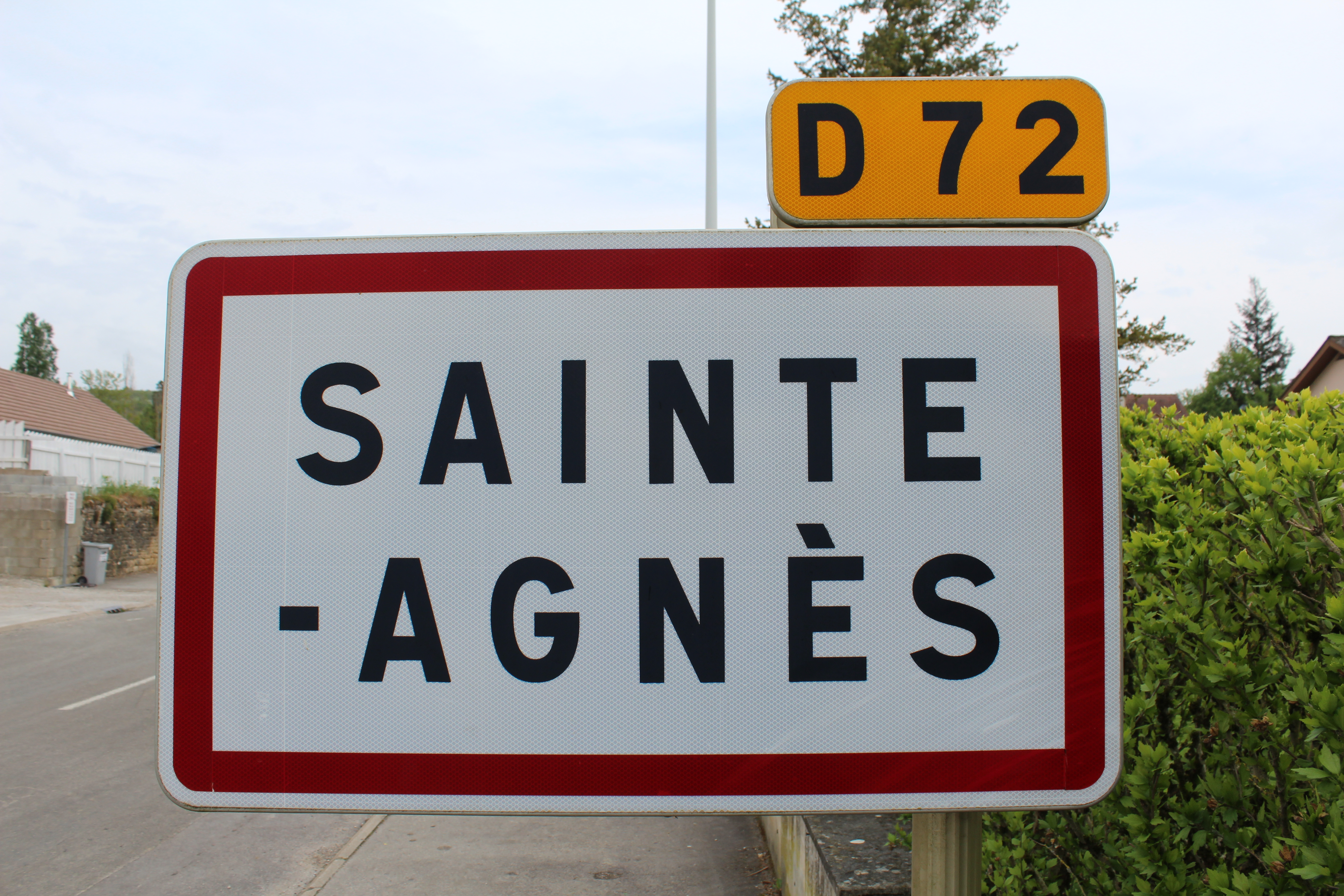 Panneau d'entrée dans Sainte-Agnès, Jura.